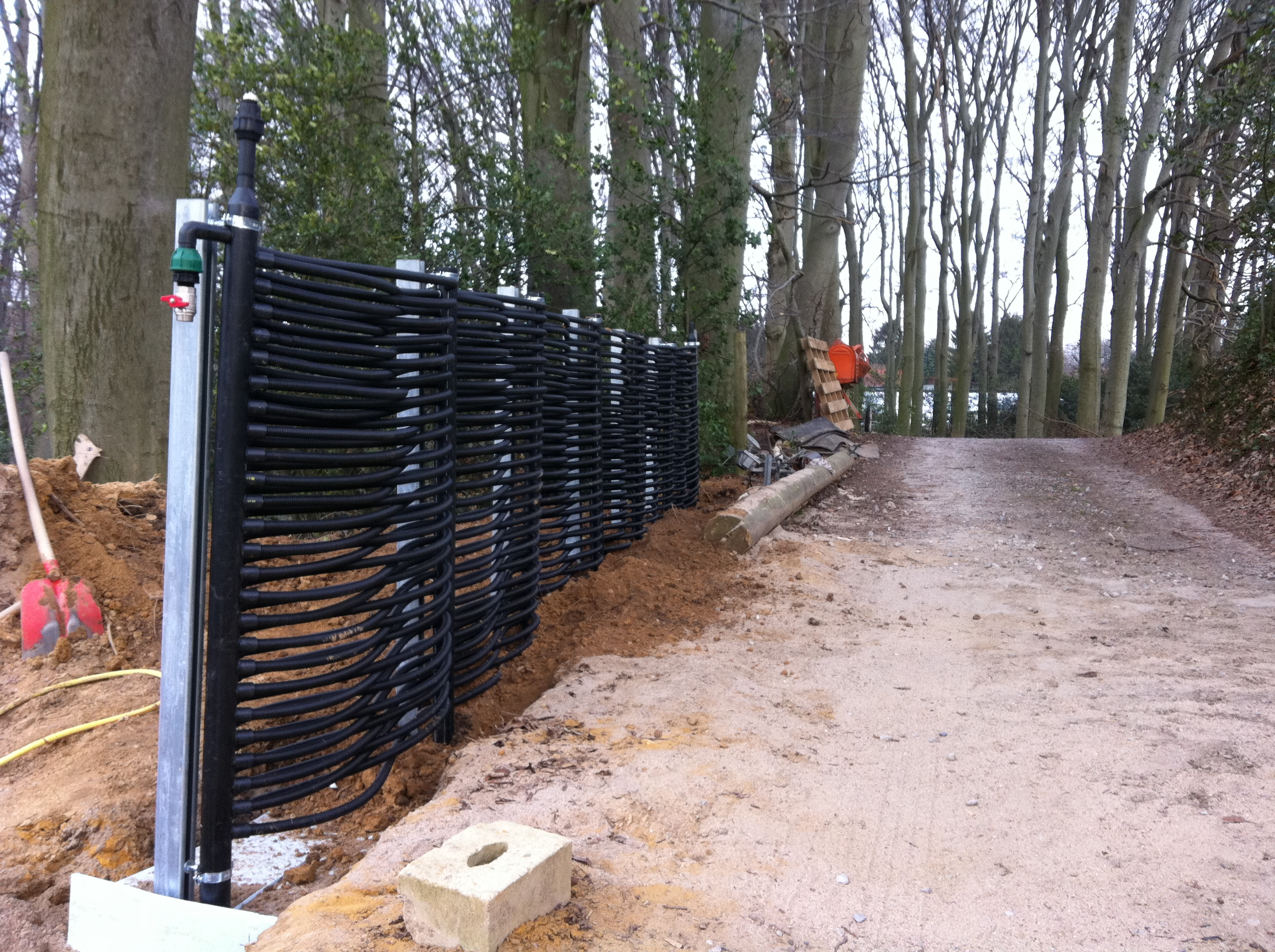 ein aufgestellter Energiezaun der Firma Schlemmer ecotech